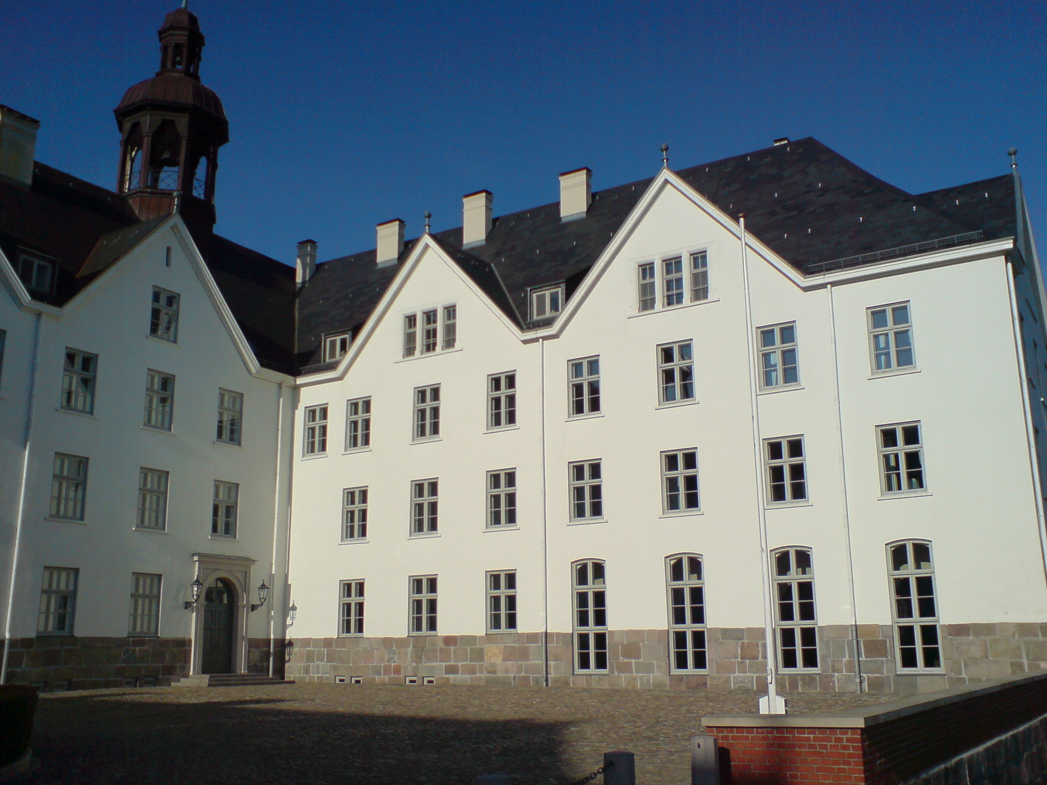 Schloss Plön, Ostflügel